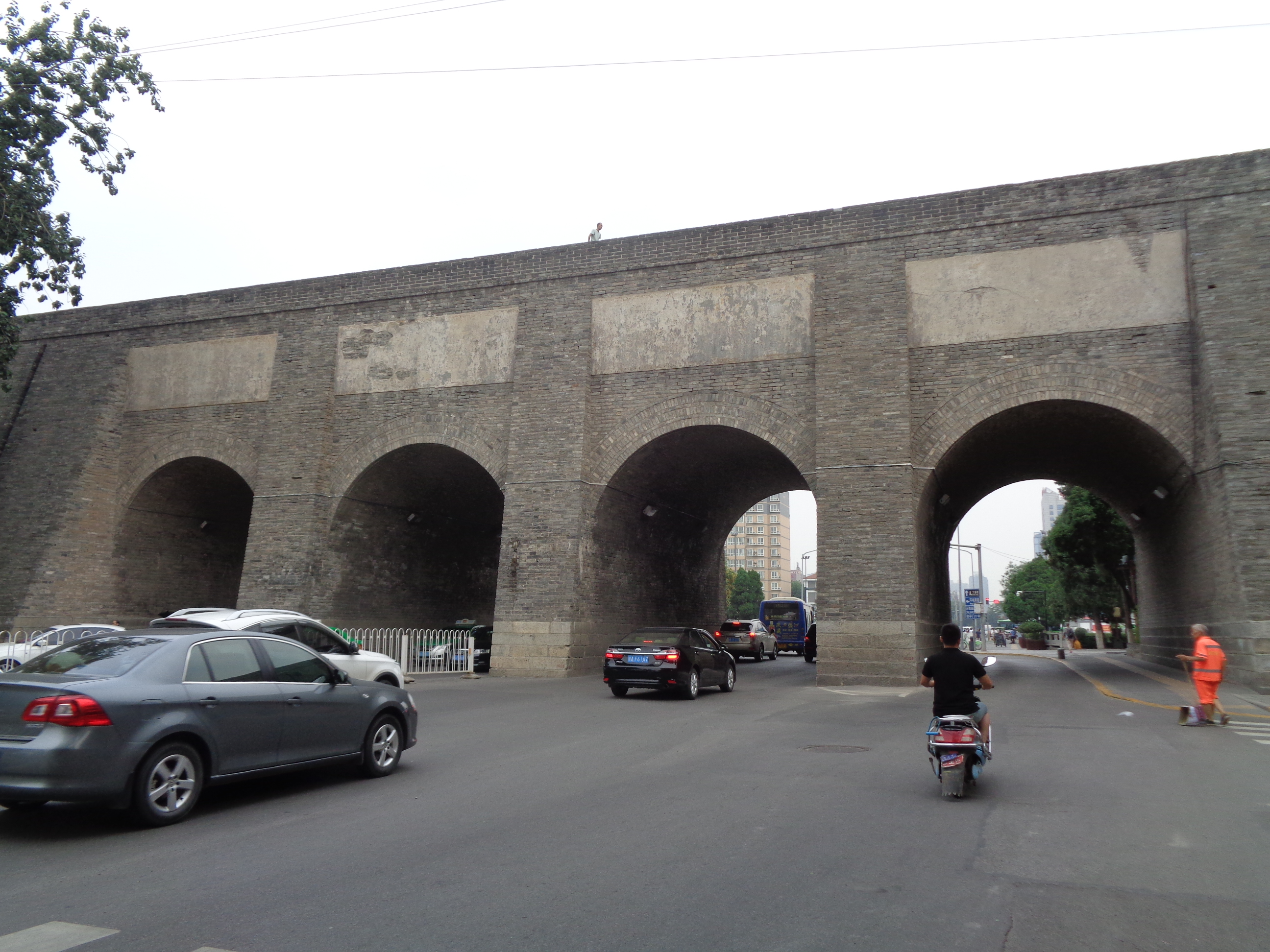 西安市碑林区城墙和平门